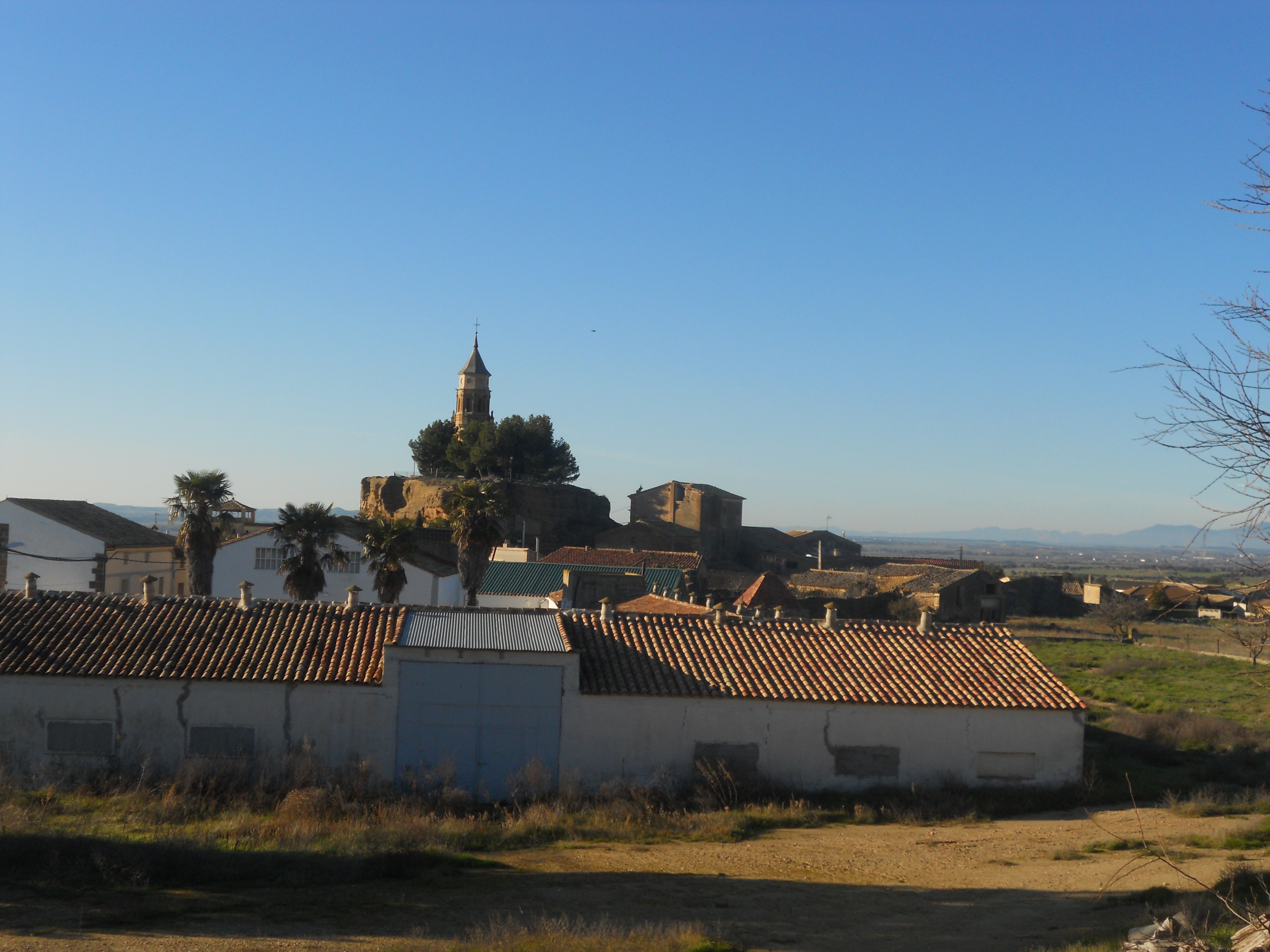 Albero Alto ( Huesca ) .